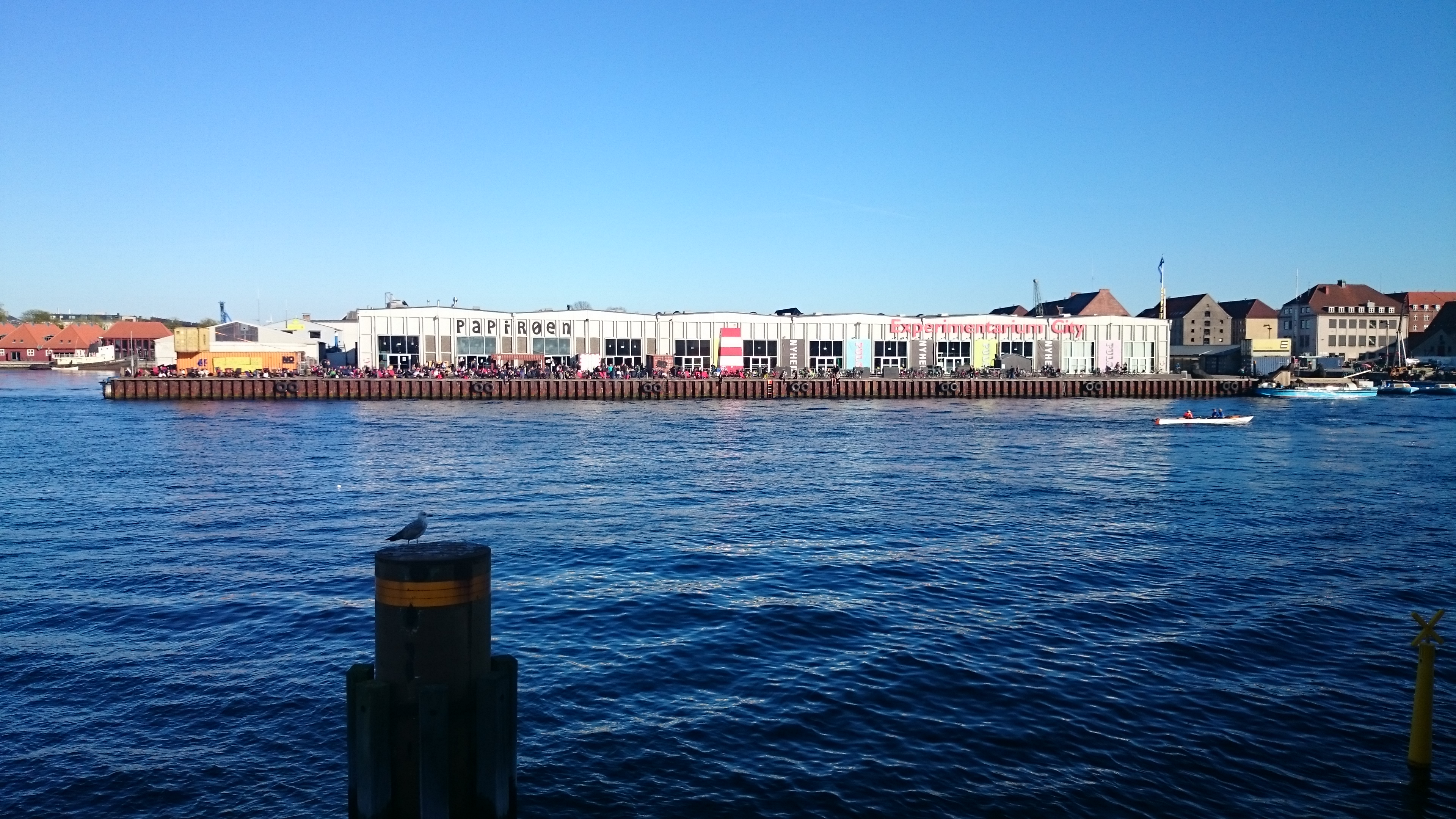 Papirøen set fra Skuespilhuset.